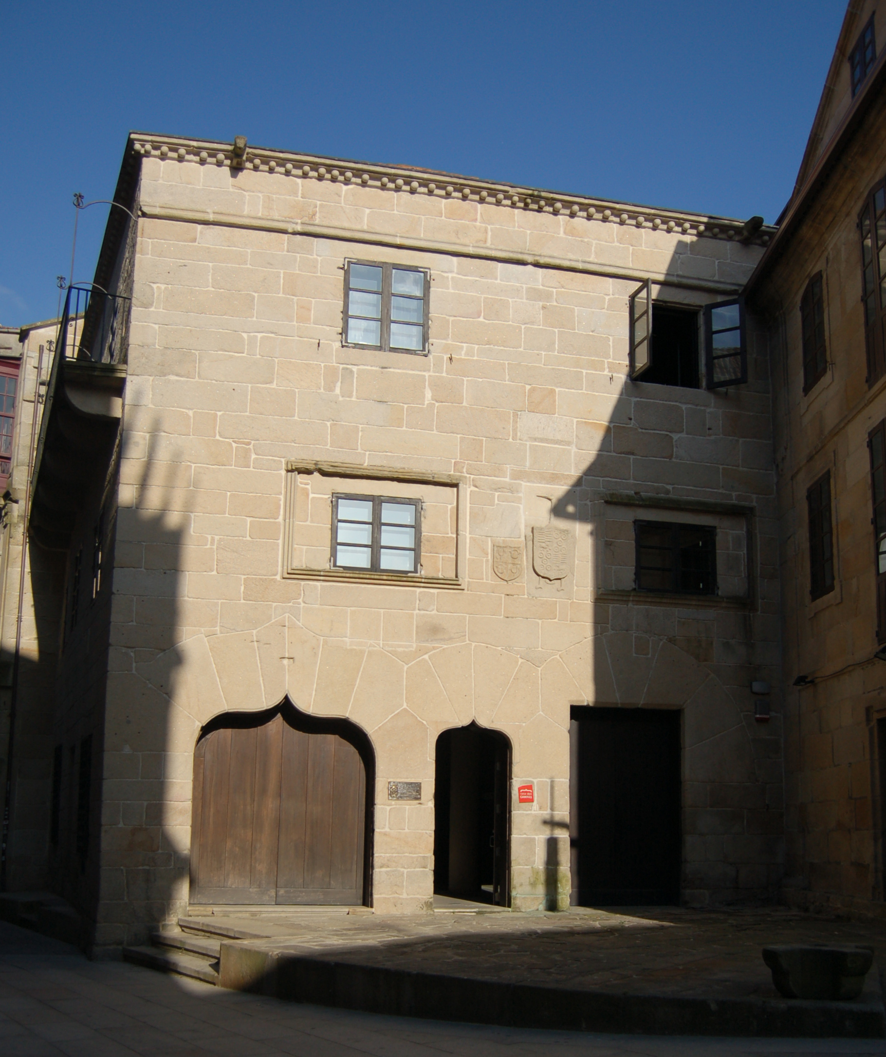 Casa das Campás, en Pontevedra